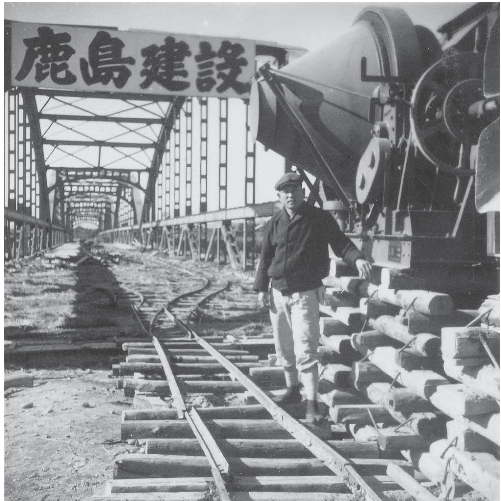 昭和27年 群馬大橋建設現場での永井運輸㈱創業者の永井常松氏